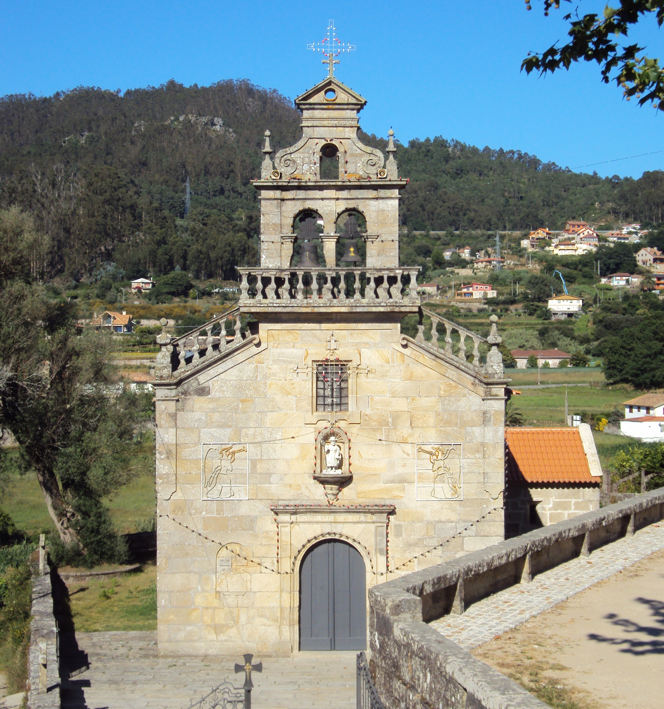 Igrexa parroquial de Santiago de Parada, Nigrán